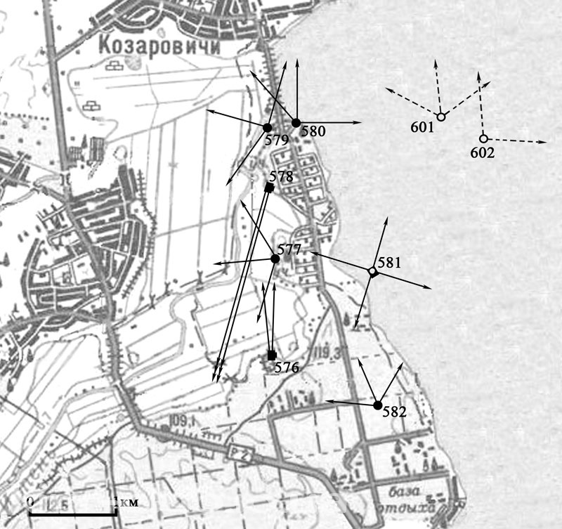 Схема БРО 21 Київського укріпленого району, викладена у вільний доступ авторами книги "Киевский укрепленный район 1928—1941" (